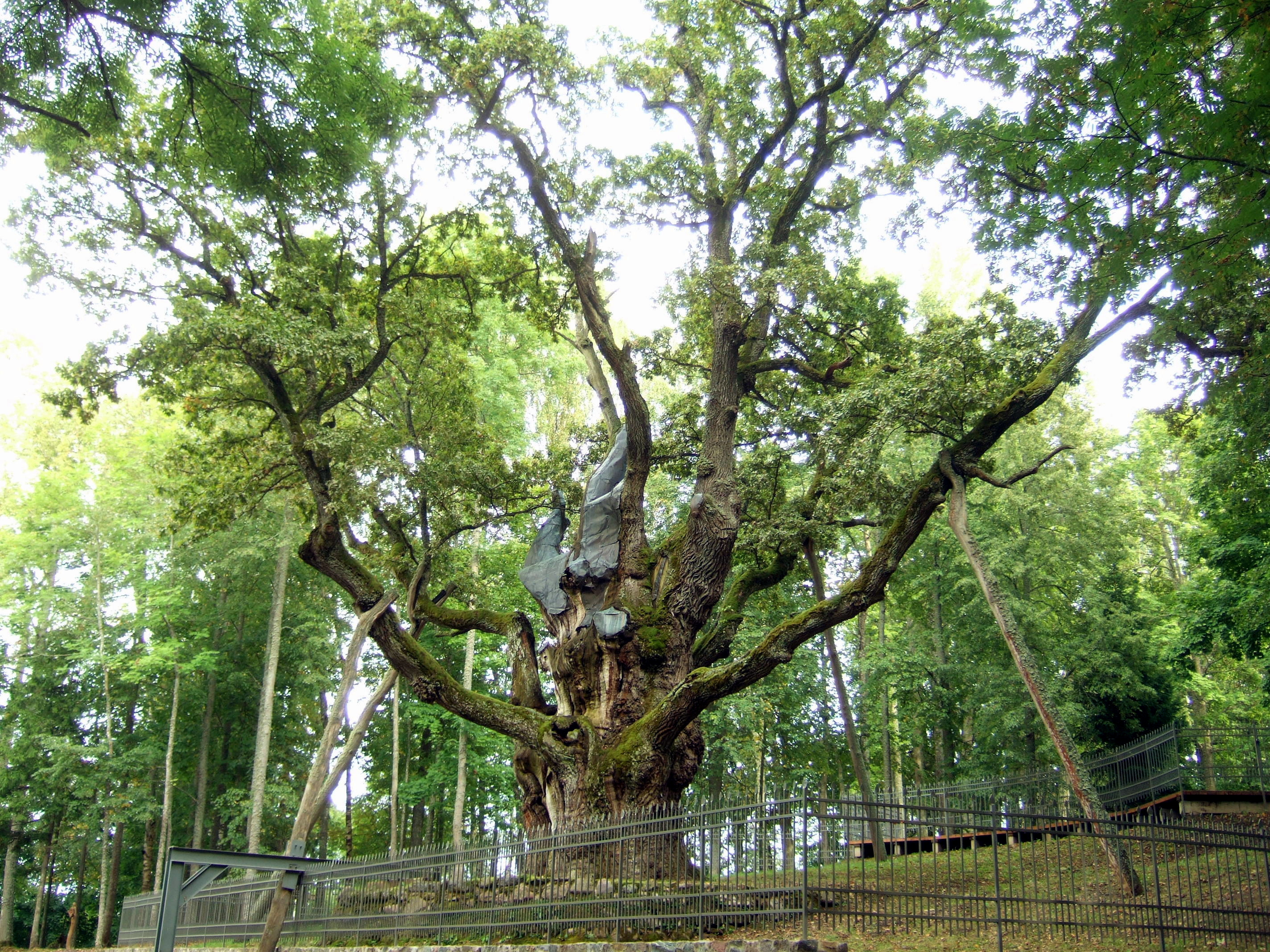 Stelmužės ąžuolas 2015 m. rugsėjį.